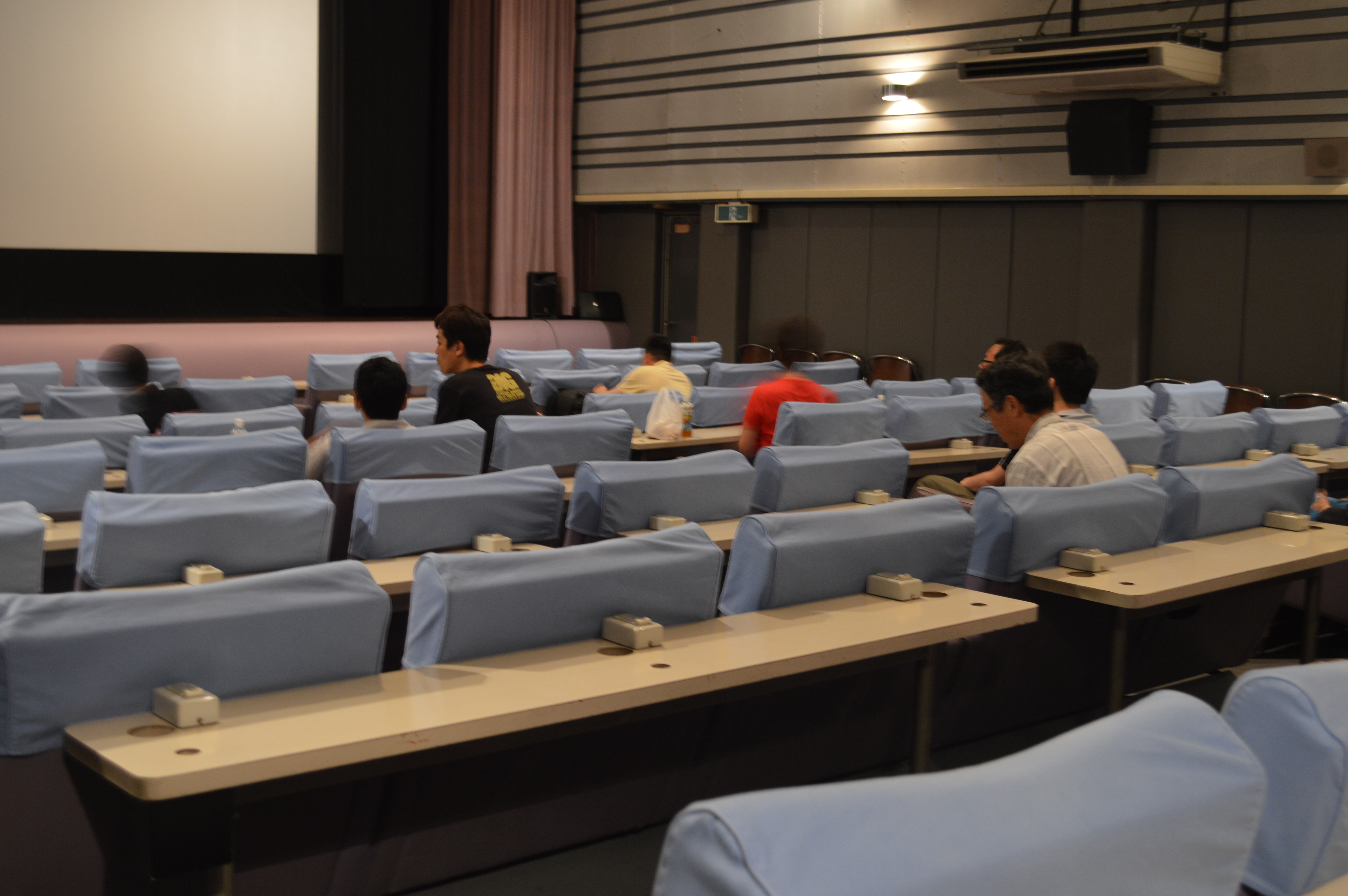 広島市の映画館、サロンシネマ。2014年に八丁堀に移転する前の鷹野橋時代。